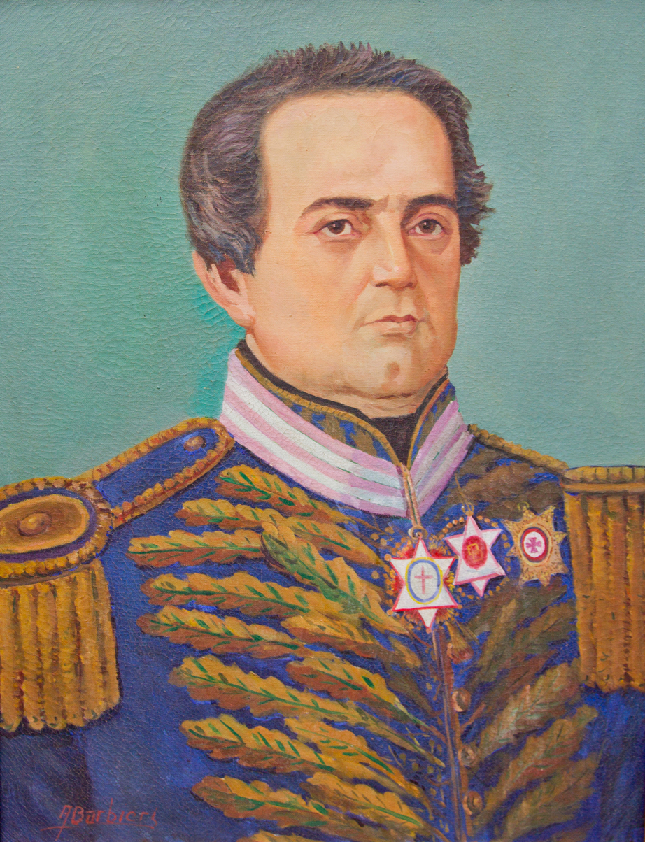 Óleo sobre tela. Pintura de Rafael Tobias de Aguiar (1795 - 1857), por A. Barbieri. Em exposição no Museu Histórico Sorocabano.